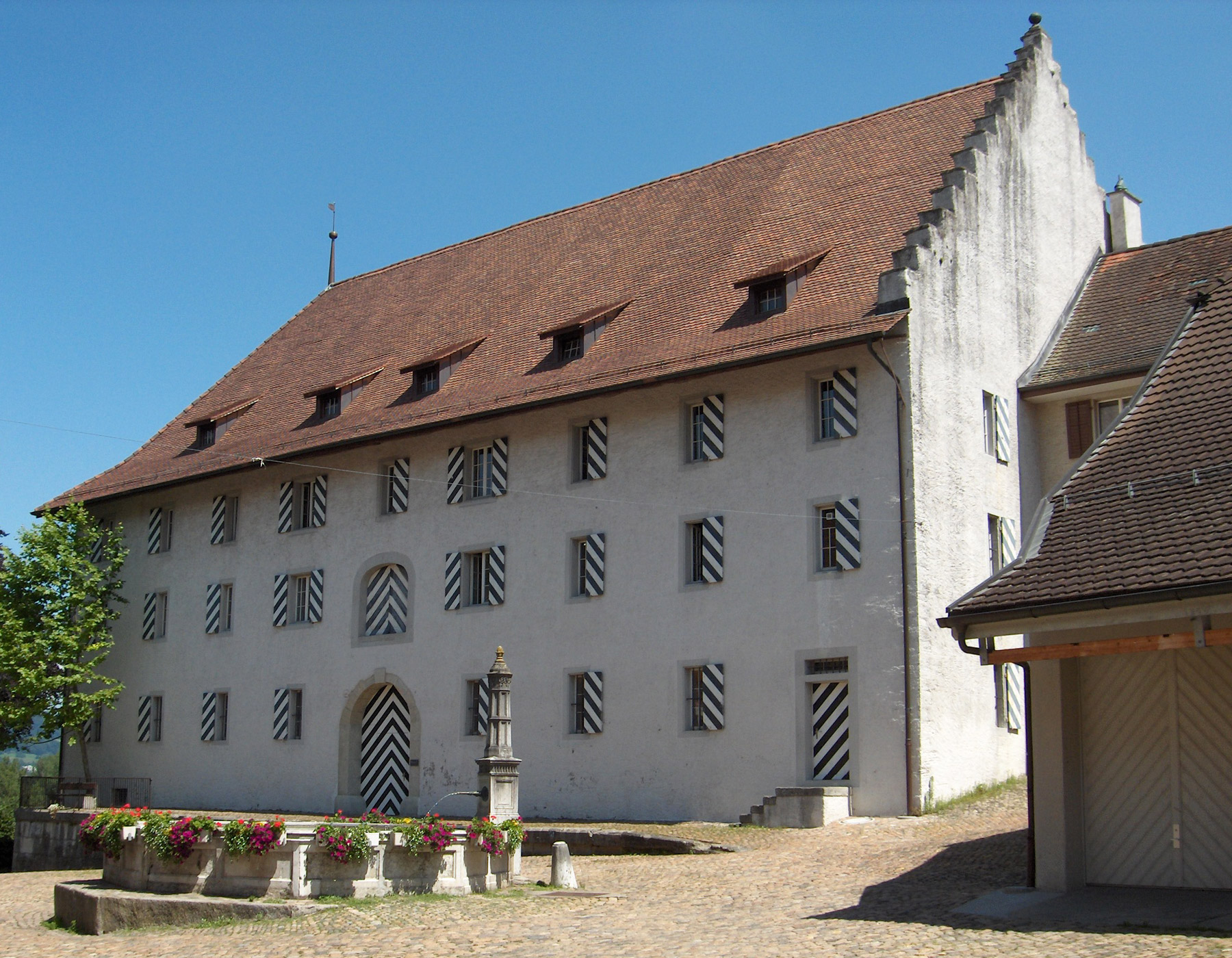 Salzhaus Brugg Fotografiert durch Voyager, 28. Juni 2006 Brugg Salt House Photo taken by Voyager, 28 June 2006